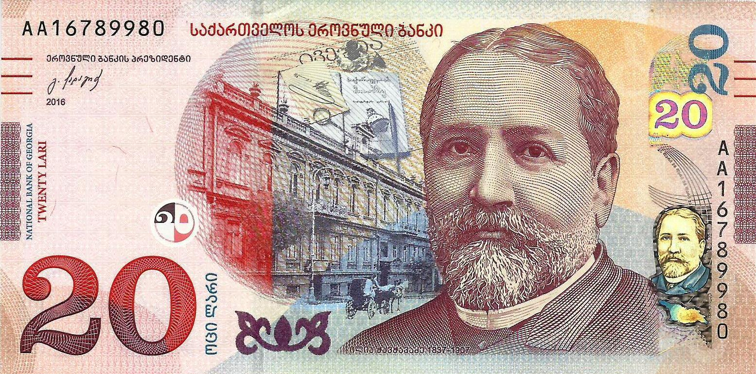 Изображение Чавчавадзе на обновленной грузинской купюре 20 лари